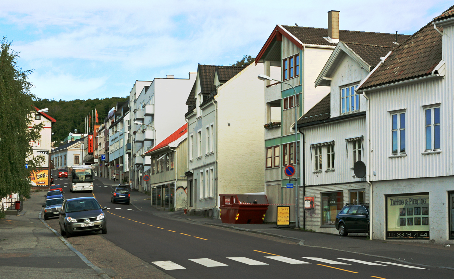 Prinsegata, Larvik